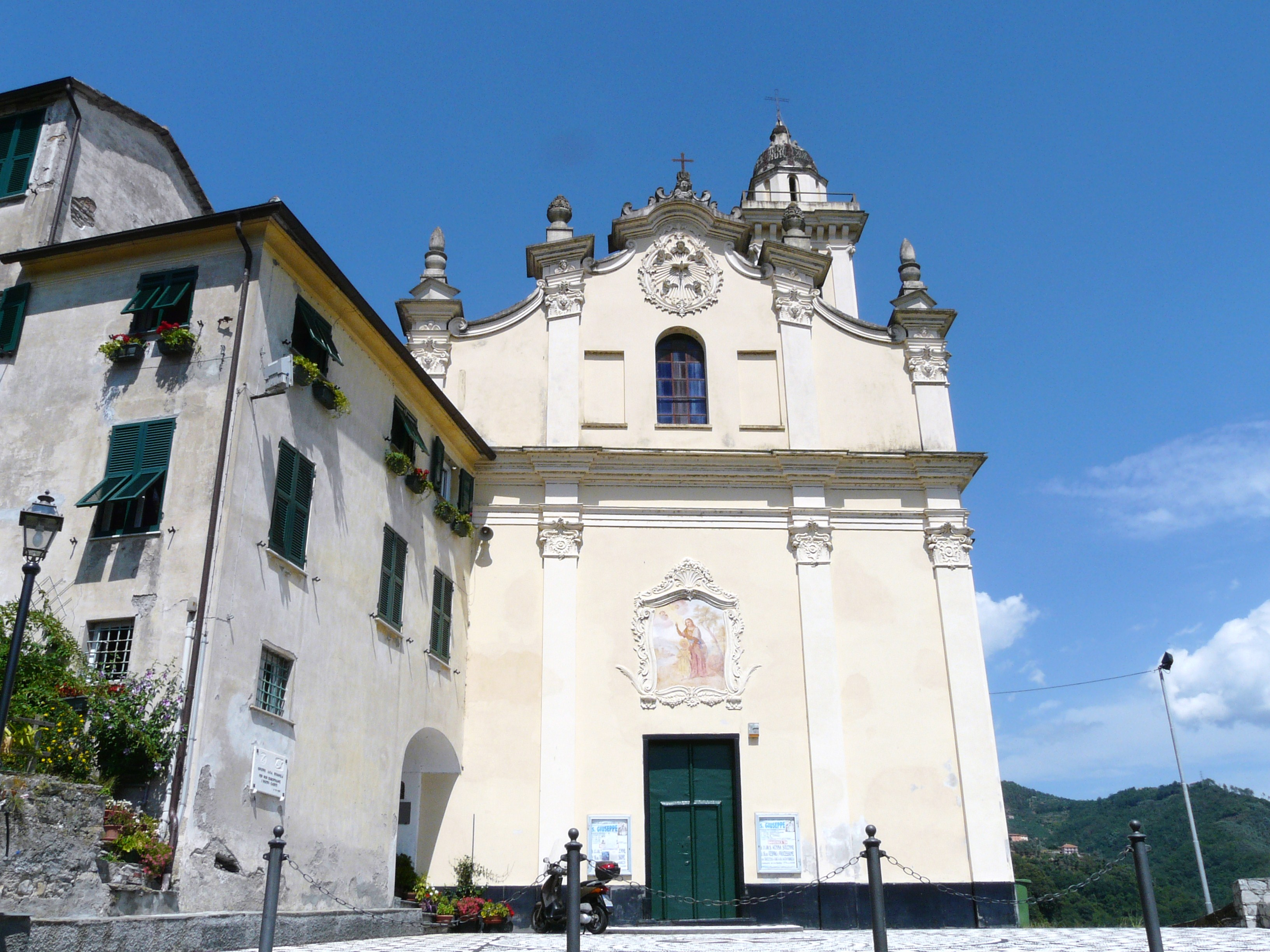 Chiesa dei Santi Quirico e Giulitta, Rivarola, Carasco, Liguria, Italia